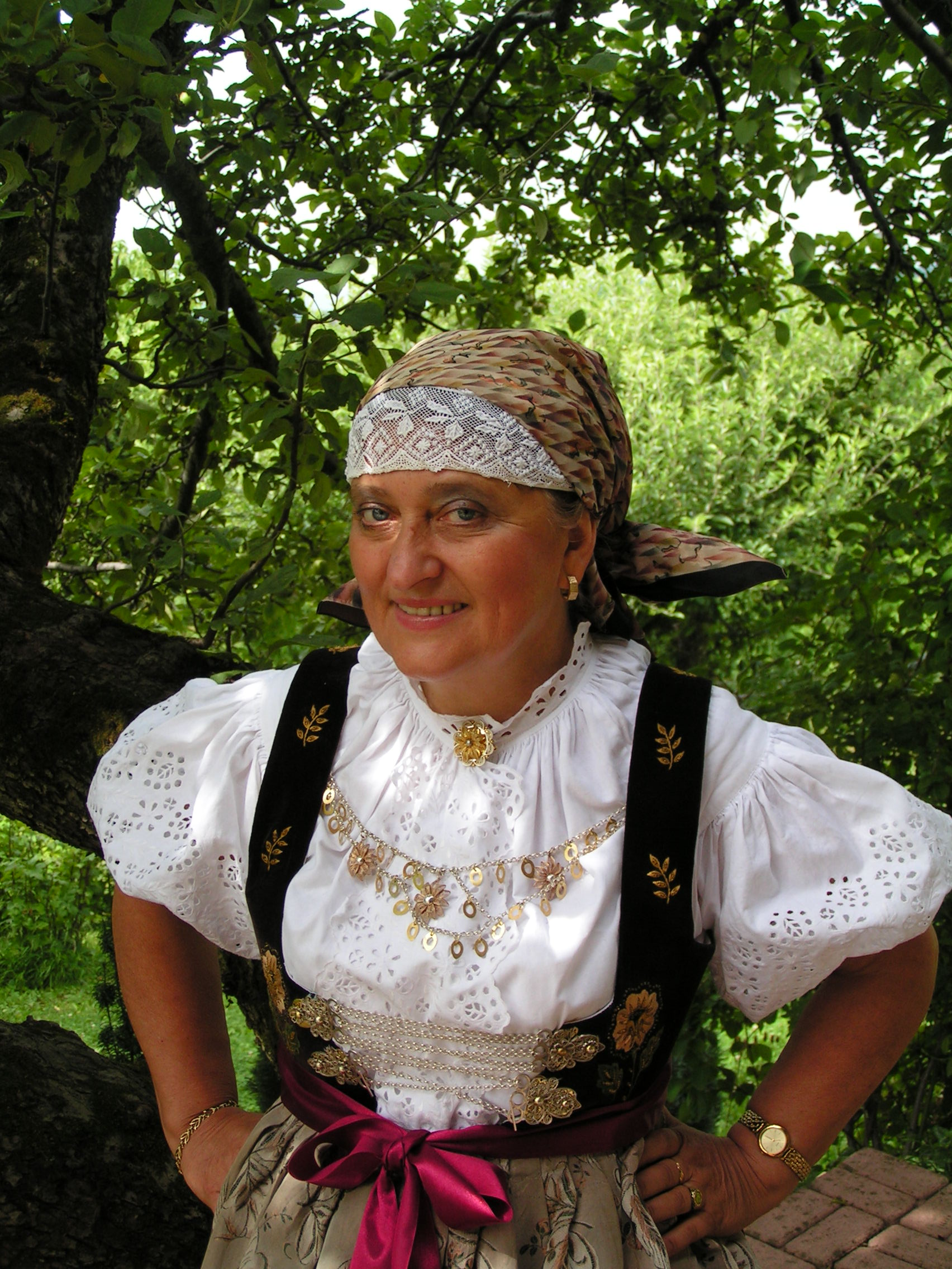 Władysława Magiera w stroju cieszyńskim